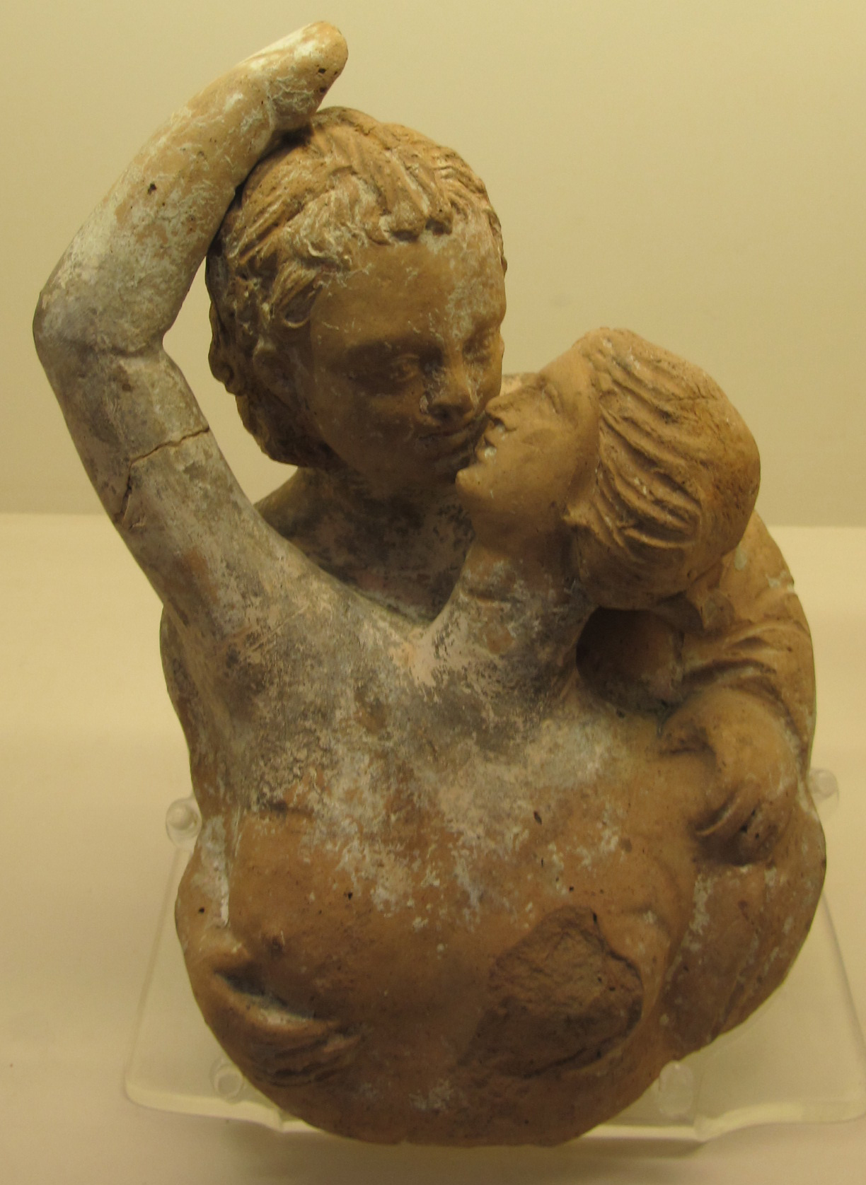 Centuripe, statuetta di eros e psiche che si abbracciano, 200-100 ac. ca.